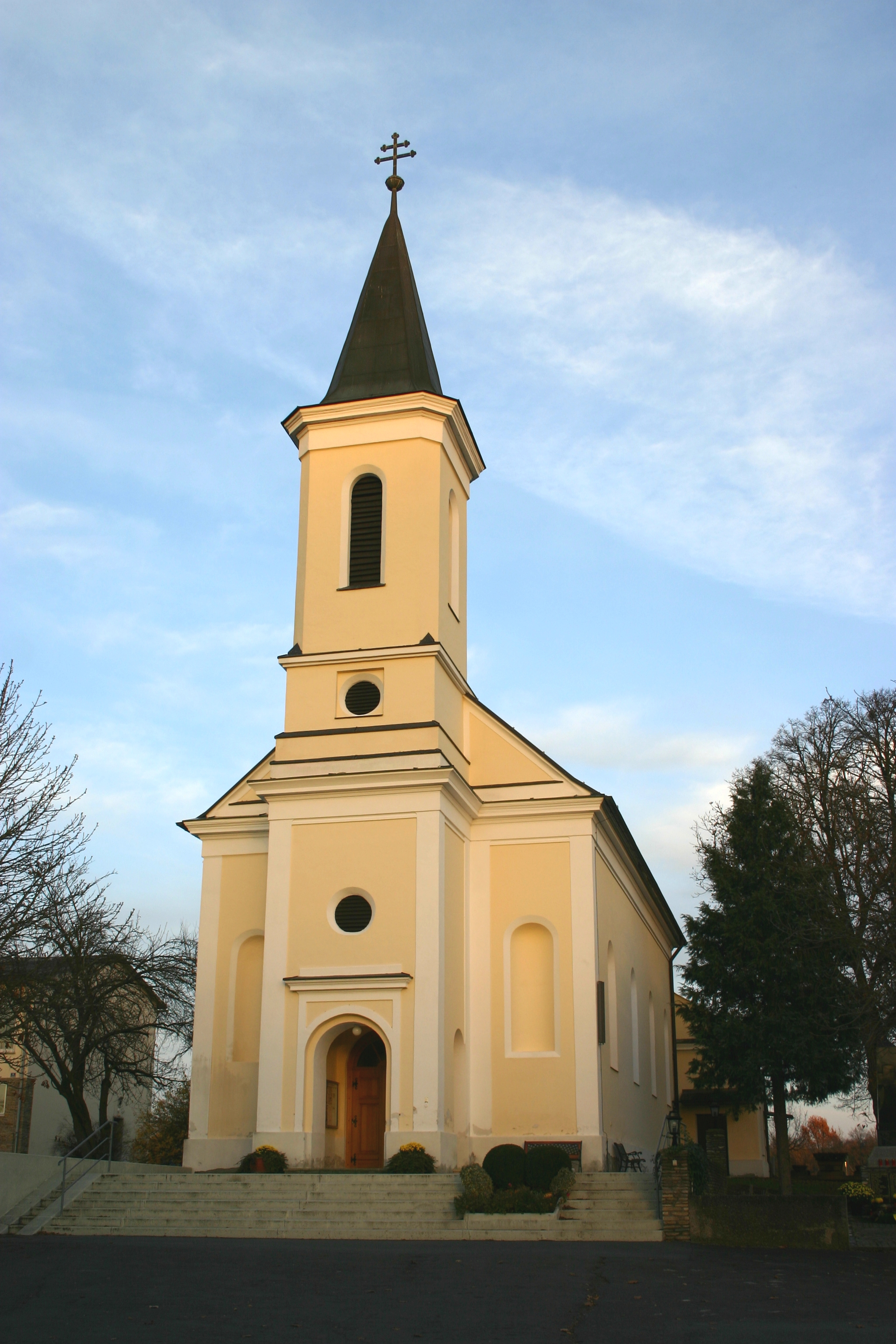 Tobaj römisch-katholische Kirche im Ortsteil Deutsch Tschantschendorf